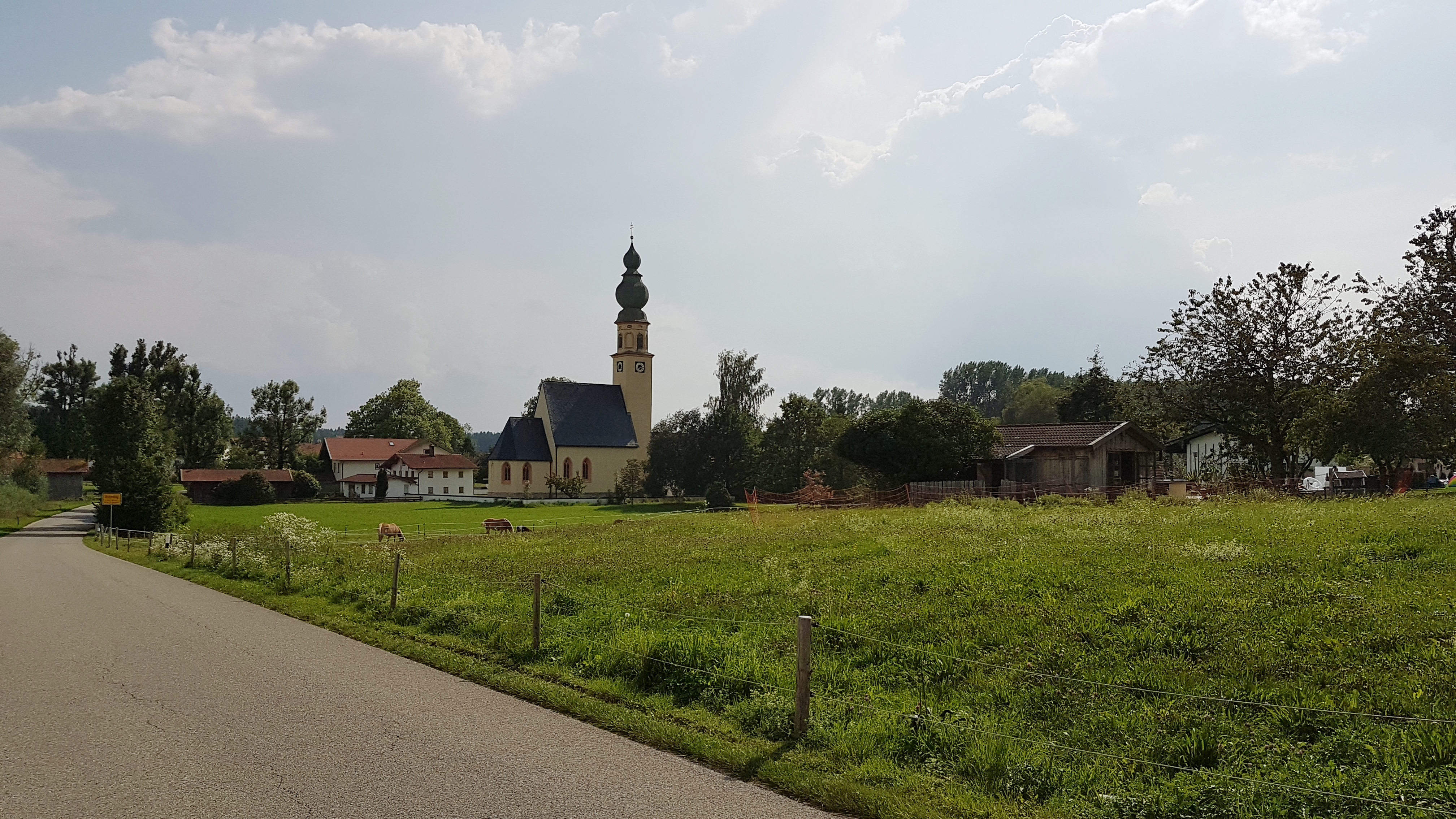 Brünning (Palling), Ortsansicht vom Norden [von der Straße nach Gengham]